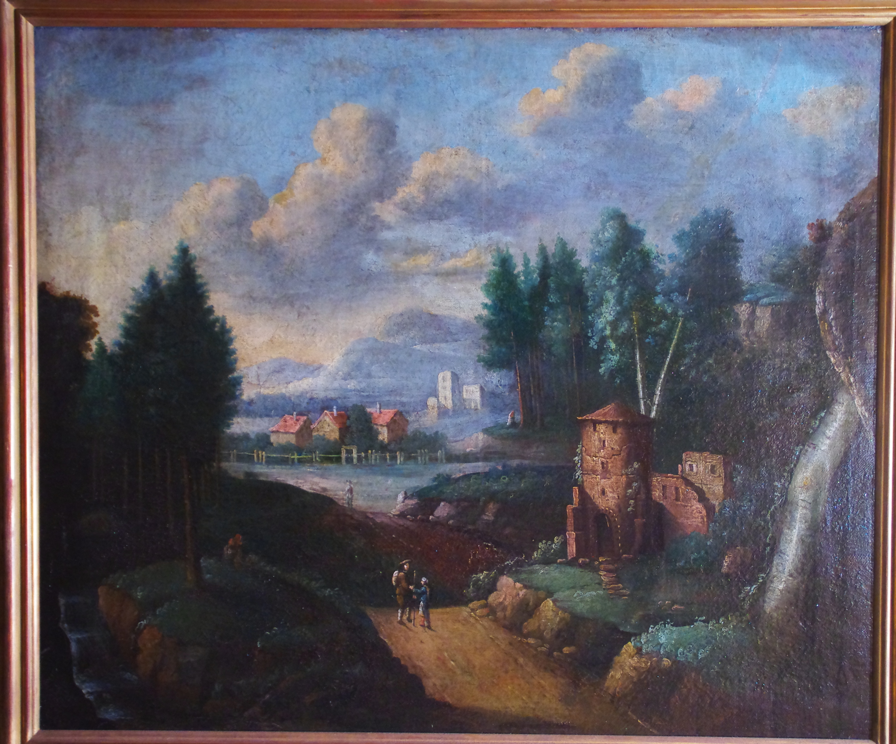 Landschaft, unsigniert, Peter von Bemmel (1685 - 1753) zugeschrieben